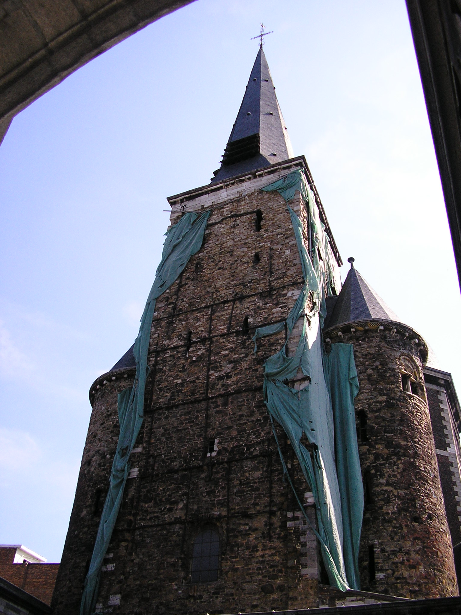 Liege, St. Jean, Westwerk